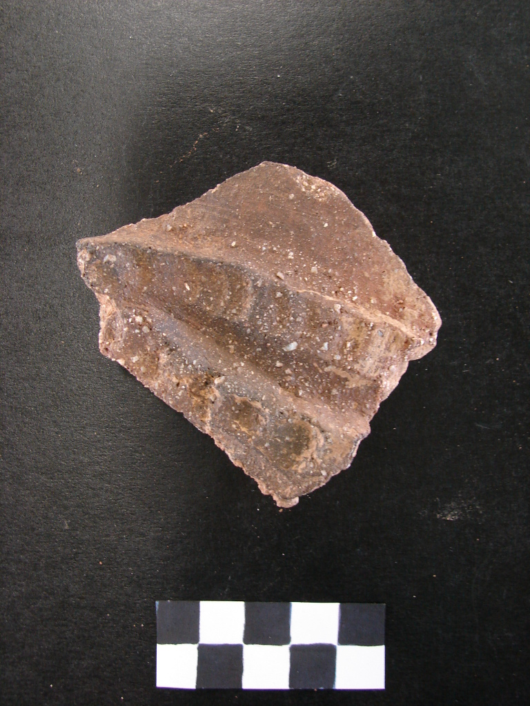 Intervenció arqueològica als carrers Reina Amàlia, Lleialtat i Carretes